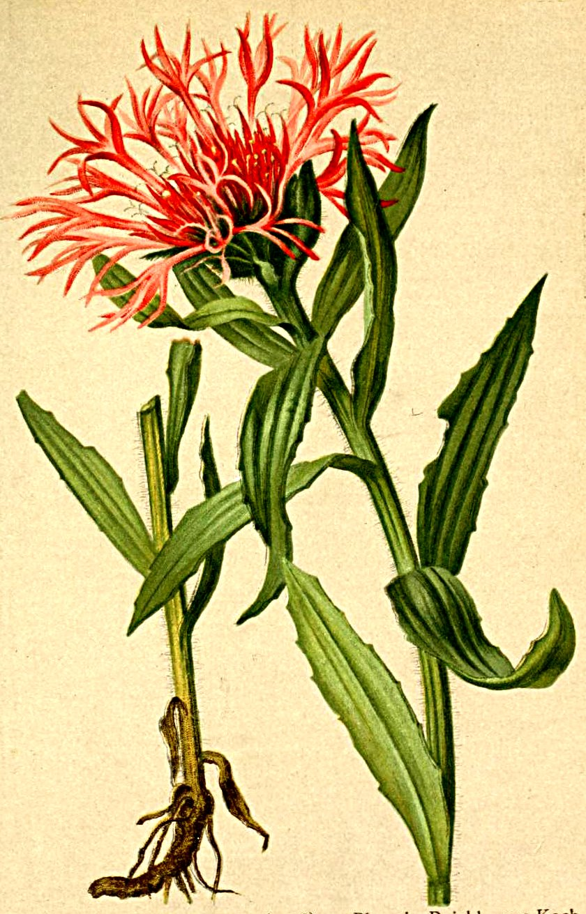 Centaurea uniflora (as Centaurea plumosa)